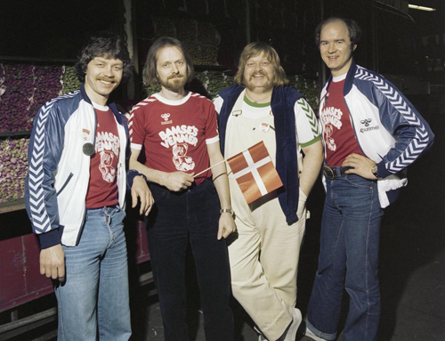 De Deense groep Bamses Venner tijdens een fotosessie voor het Eurovisie Songfestival 1980